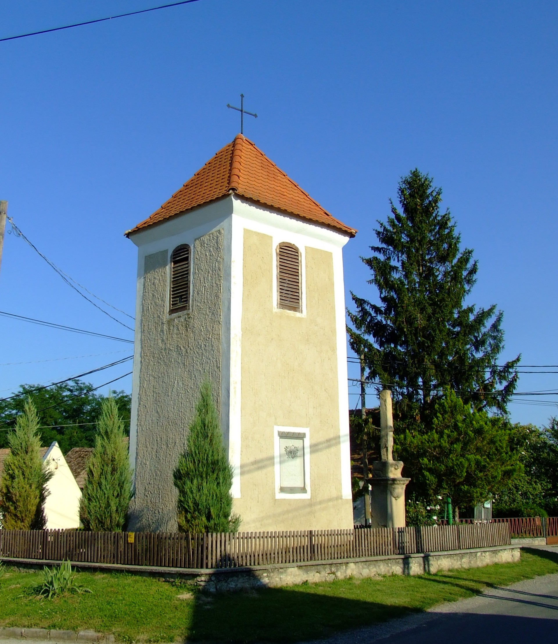 Harangláb Szellőn (Baranya megye). Műemlék épület, amely a középkorban az avarkori temető helyén épült, mint kápolna